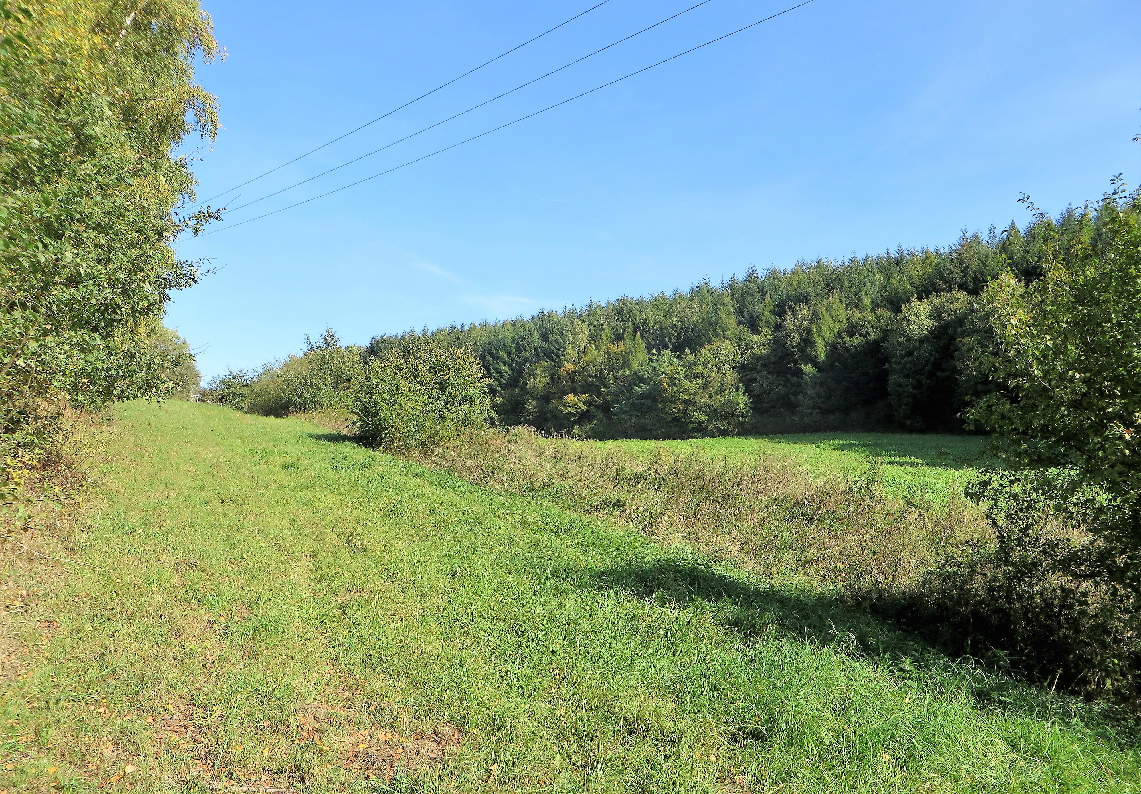 Naturschutzgebiet (OE-036) „In der Stesse“ in Attendorn. Blick vom Gutsweg auf das Schutzgebiet nach Norden (Foto rechts).